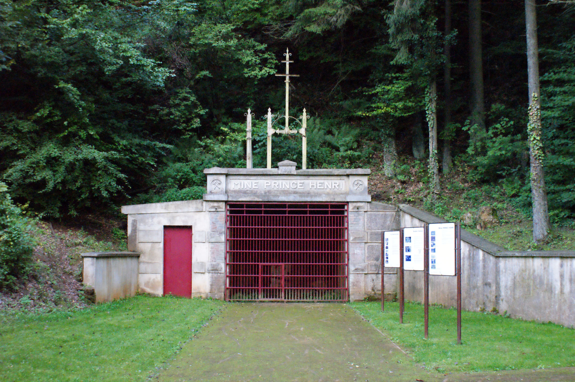 Agank vun der Mine Prince Henri no der Restauratioun. Eisekaul, Esch-Uelzecht. September 2010